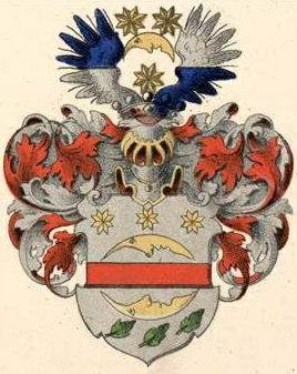 Löwis of Menari aadlivapp